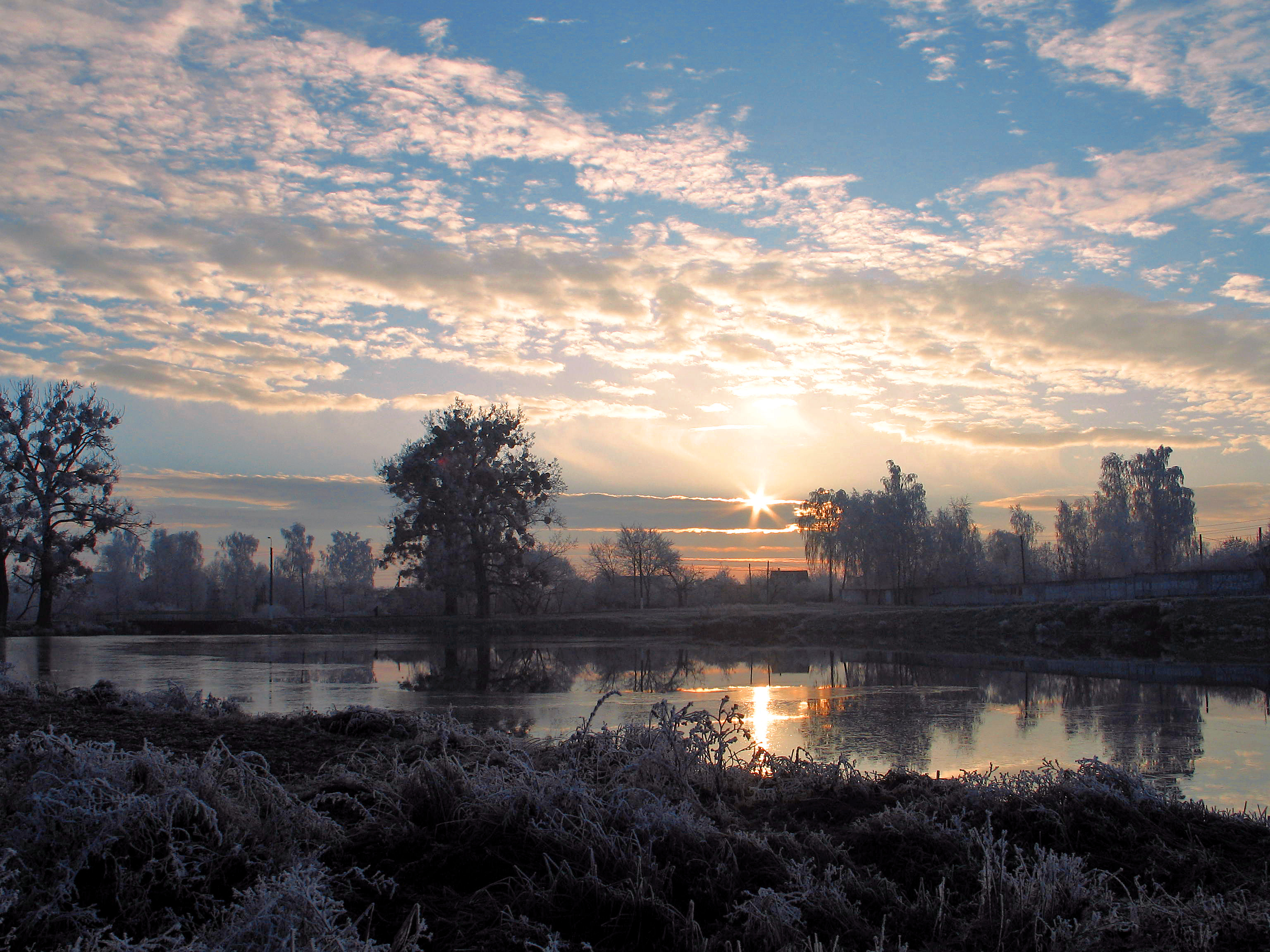 Річка Хоморець в Полонному. Хоморець поблизу вулиці Ходякова.